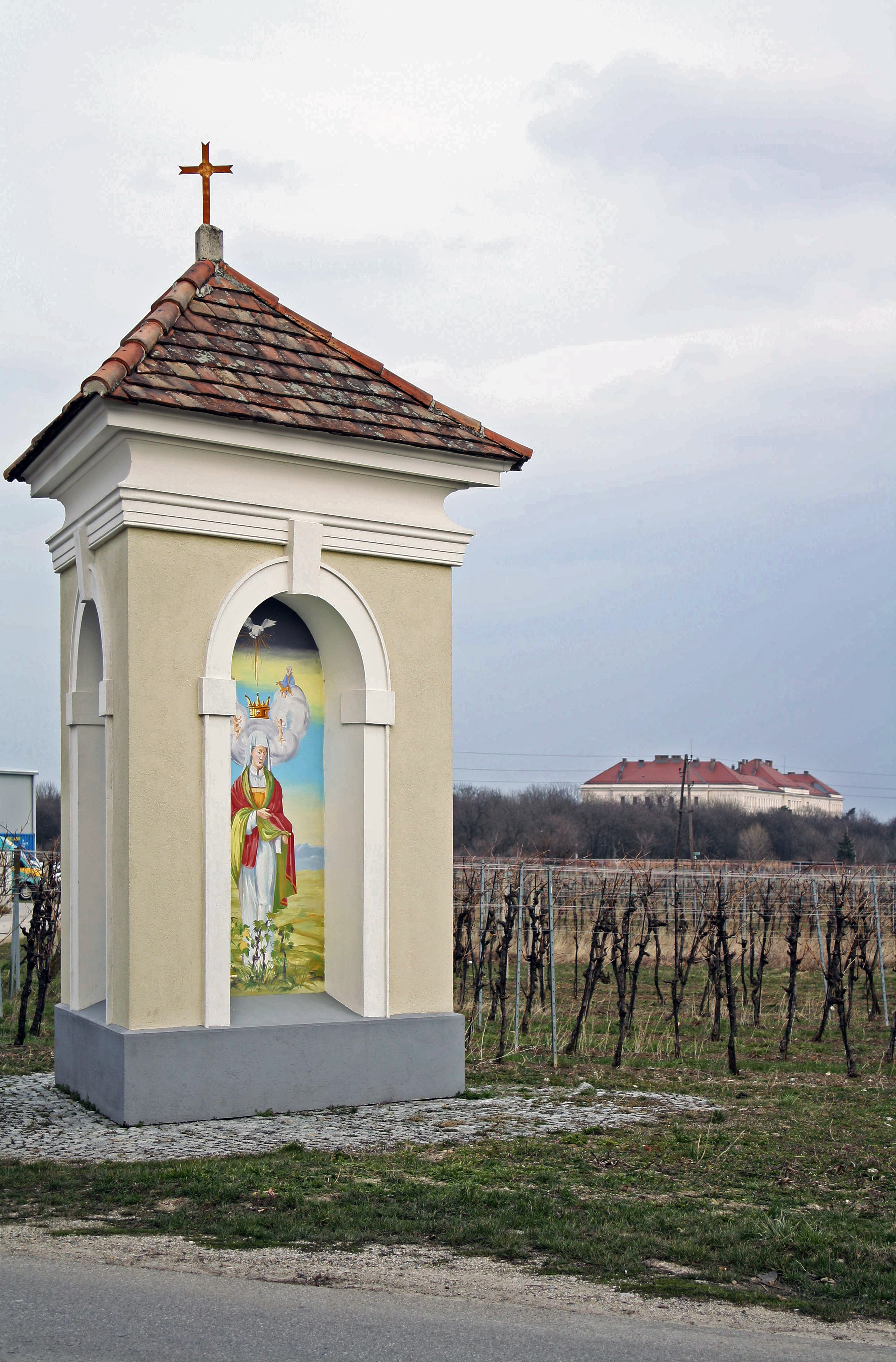 Niederösterreich: dreiseitiger Bildstock (Ursprung: 18. Jahrhundert; Wiedererrichtung: 1984) an der Gemeindegrenze von Traiskirchen (Katastralgemeinde Tribuswinkel) zu Pfaffstätten. (Im Hintergrund: Flüchtlingslager Traiskirchen).